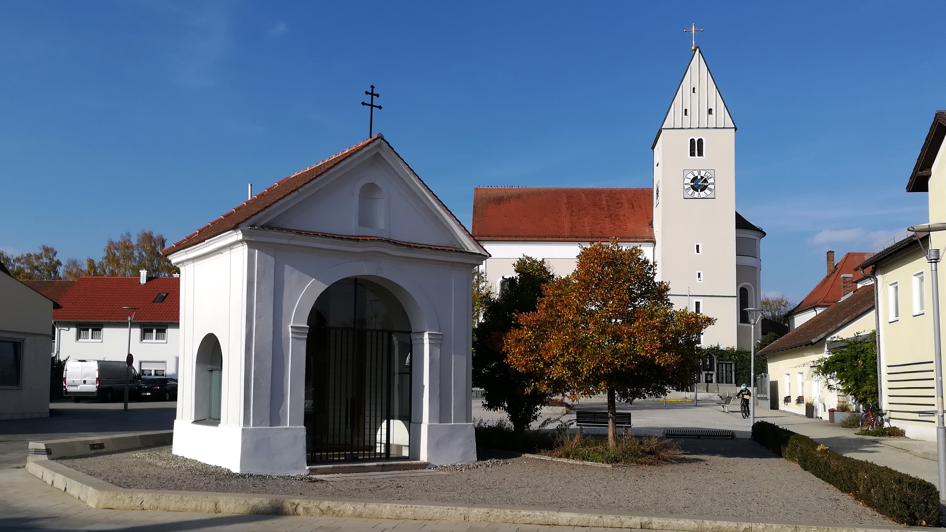 Kapelle heiliger Johannes Nepomuk in Alteglofsheim.